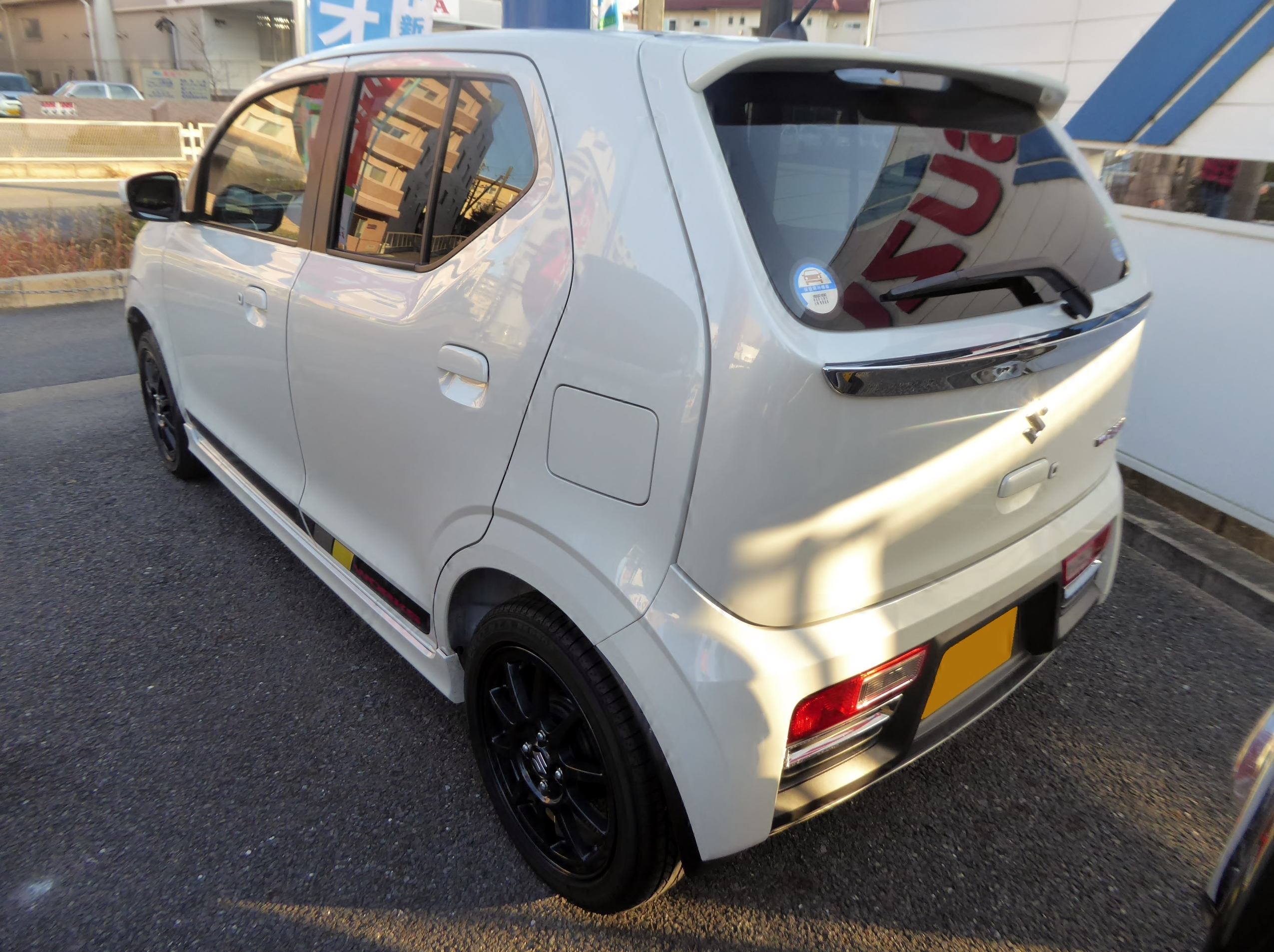 DBA-HA36S型スズキ・アルトワークスをリアから撮影。